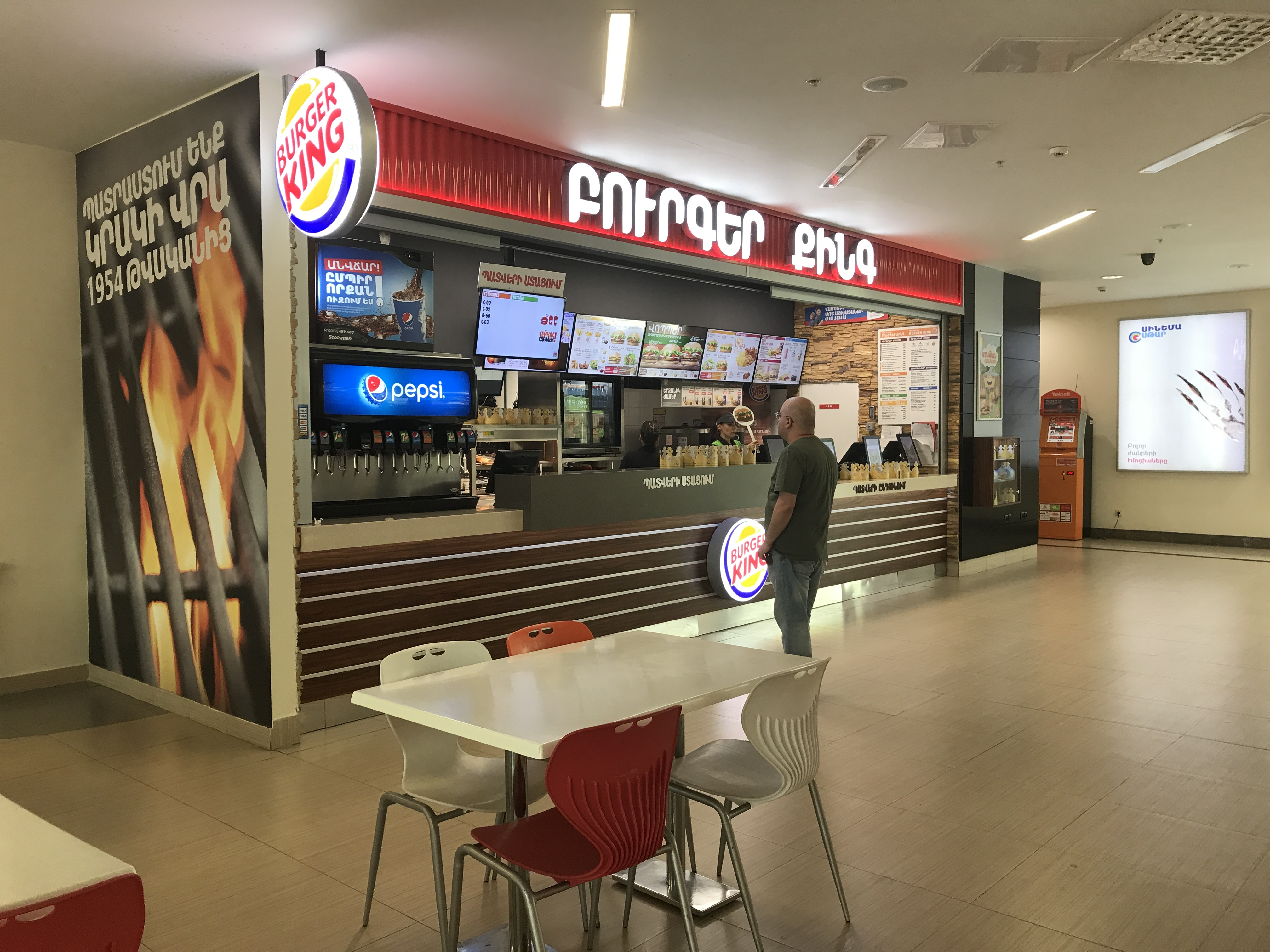 Dalma Garden Mall à Erevan en juillet 2017.